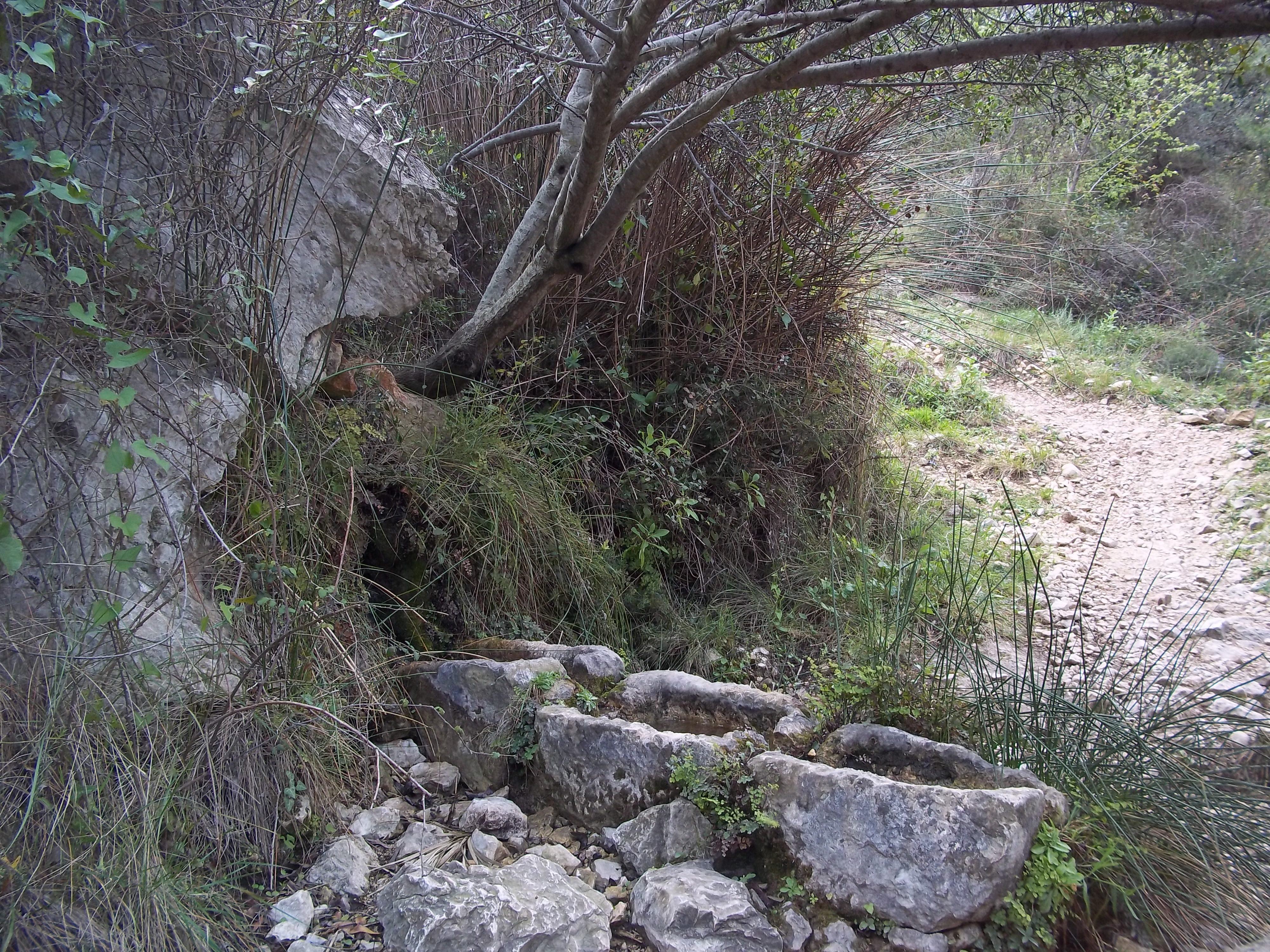 Diversos detalls del Barranc de l'Infern a la Vall de Laguar. Font de Reinós